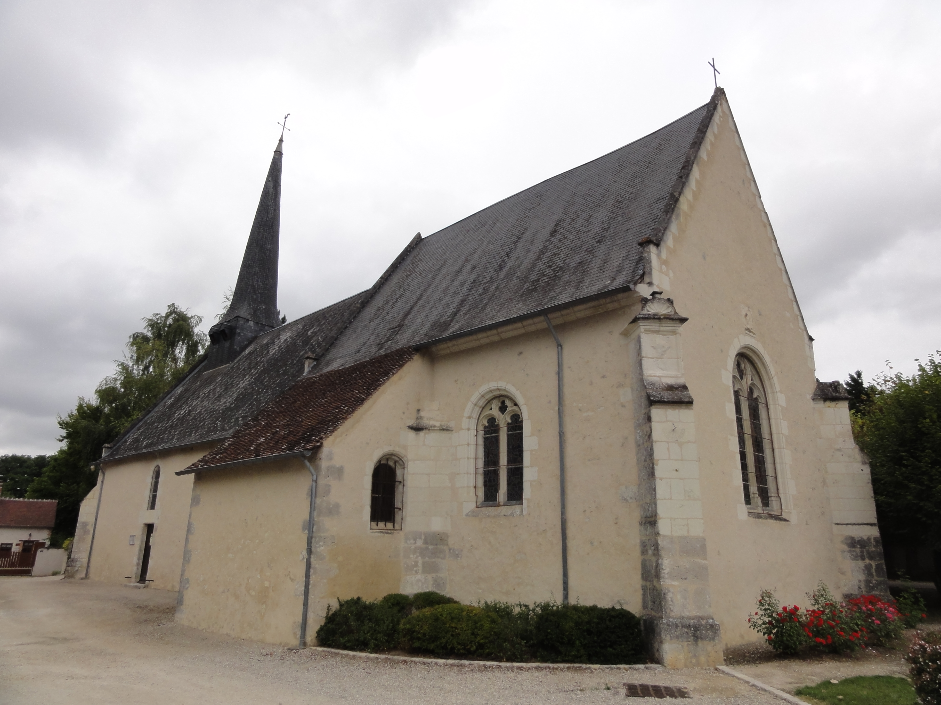 Fresnes (Loir-et-Cher) église